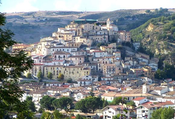 Calvello látképe (Olaszország)